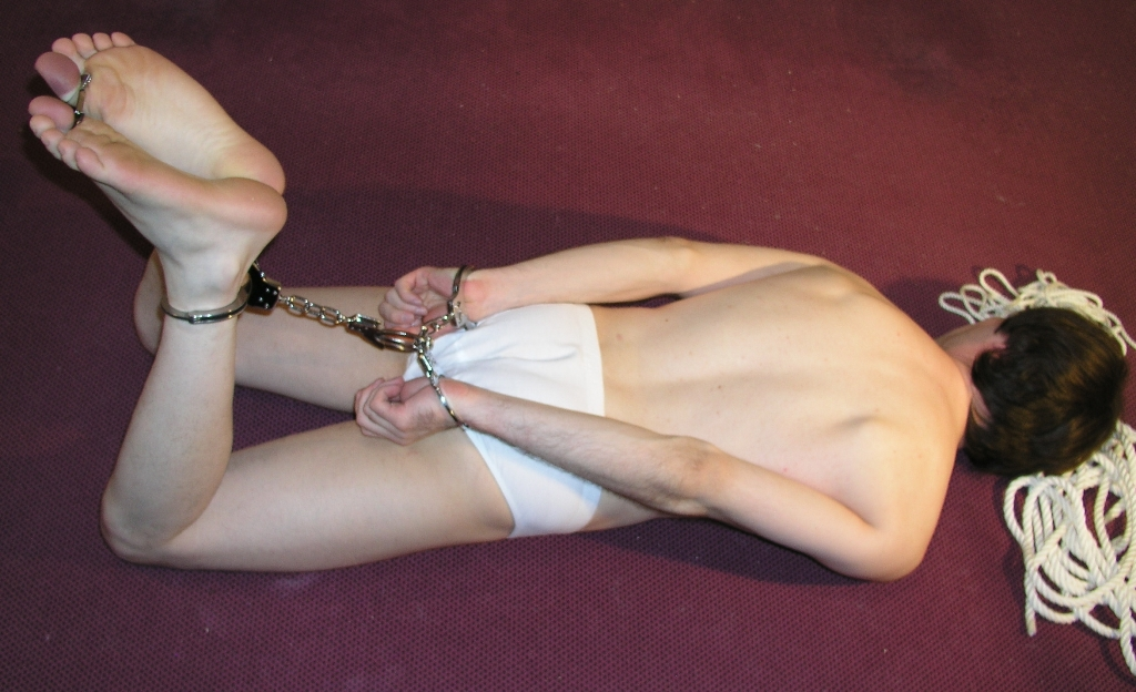 Hogtie mit Handschellen (Das Model war sowohl volljährig und mit der Fesselung, als auch mit der Abbildung des Fotos unter Wikipedia einverstanden)